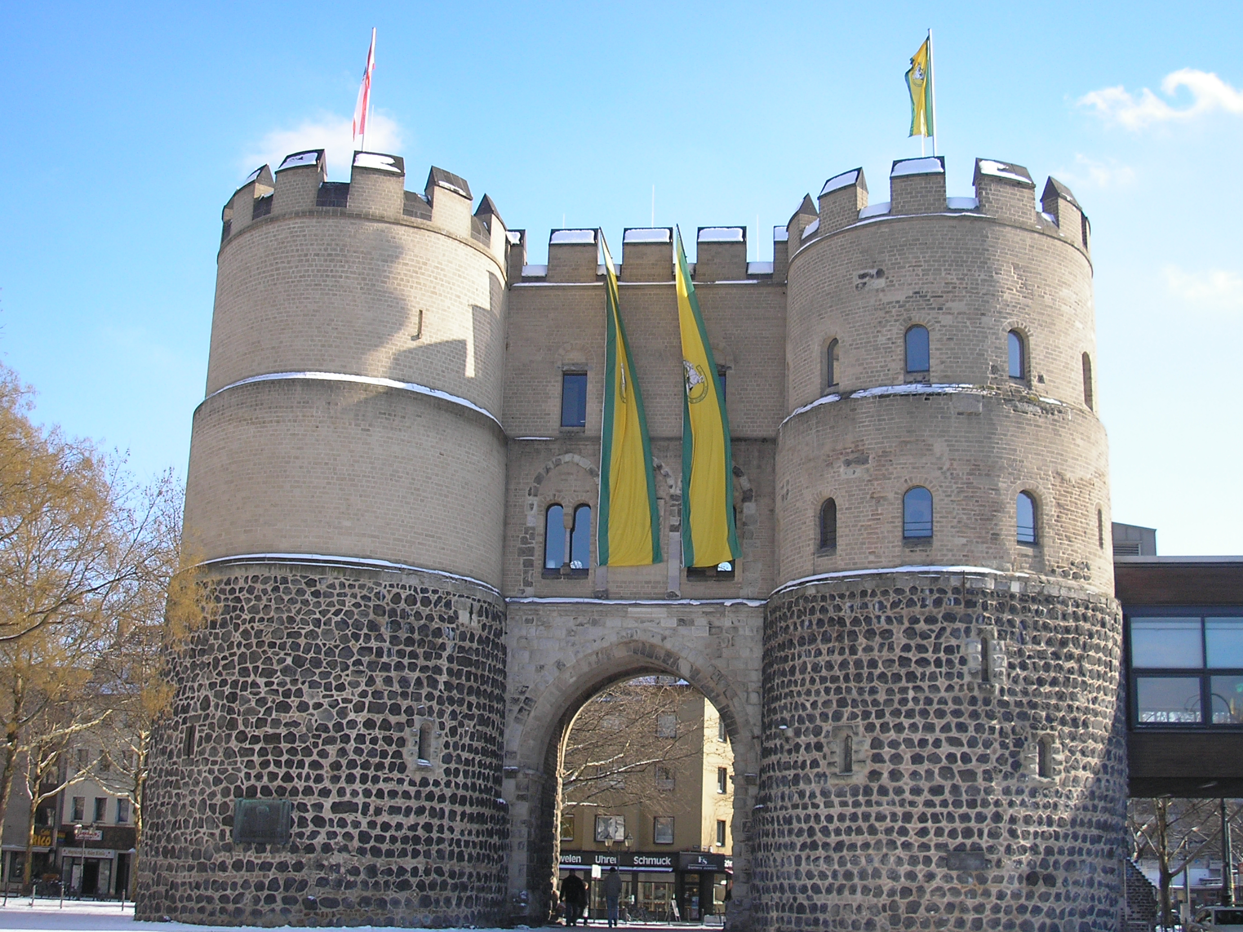 Die Kölner Hahnentorburg im Fahnenschmuck der Ehrengarde der Stadt Köln zu Karneval.